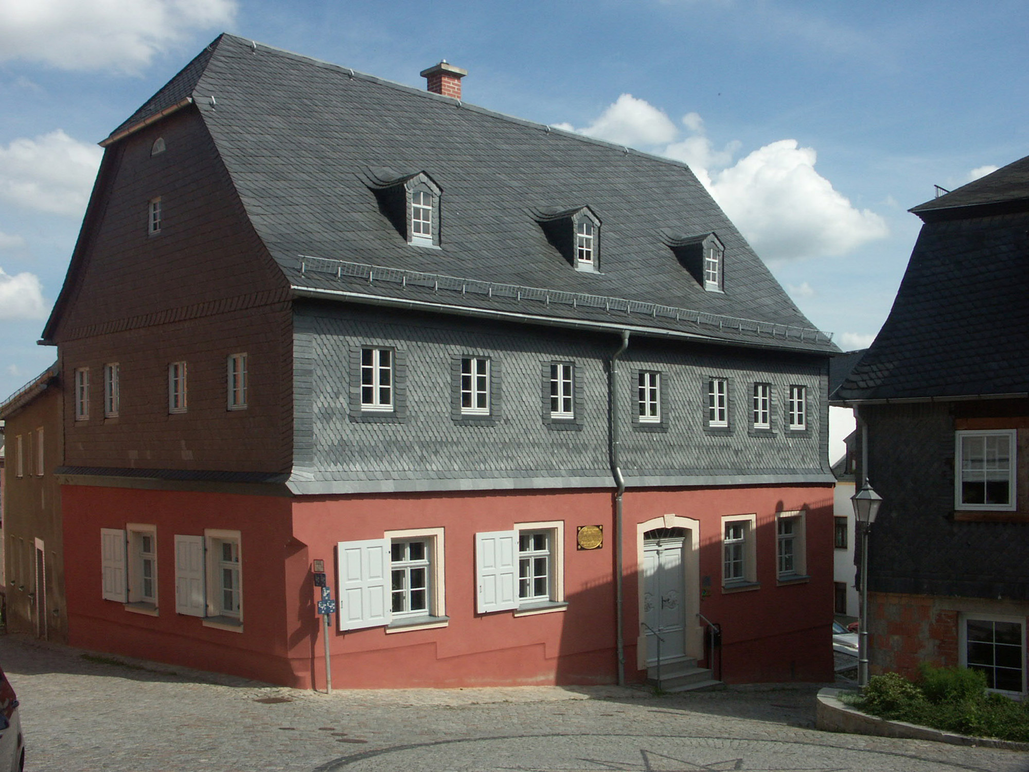 Das Geburtshaus des Dichters Paul Fleming in Hartenstein/Erzgebirge